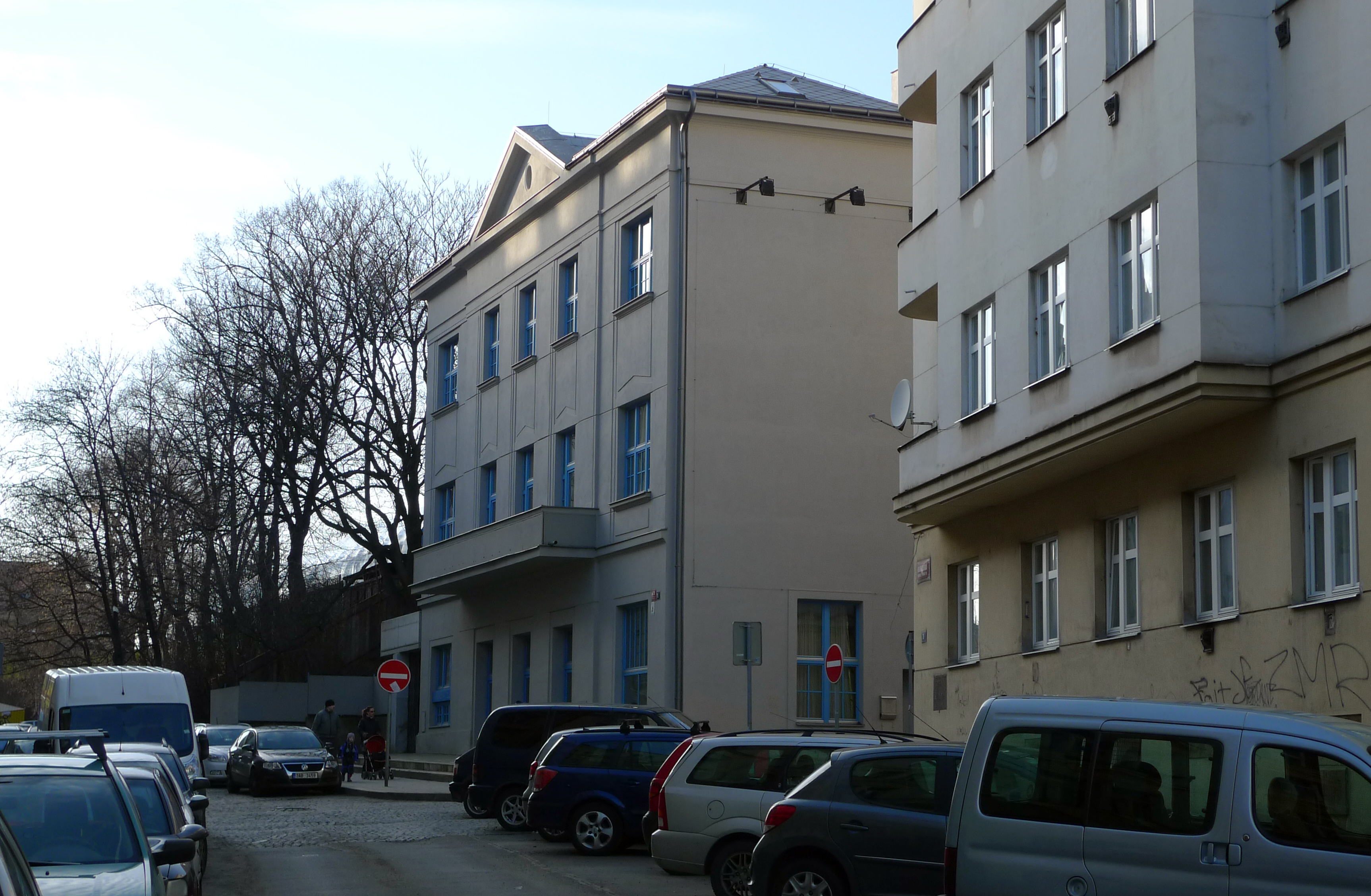 Kino Vzlet v Praze 10-Vršovicích v ulici Holandská.